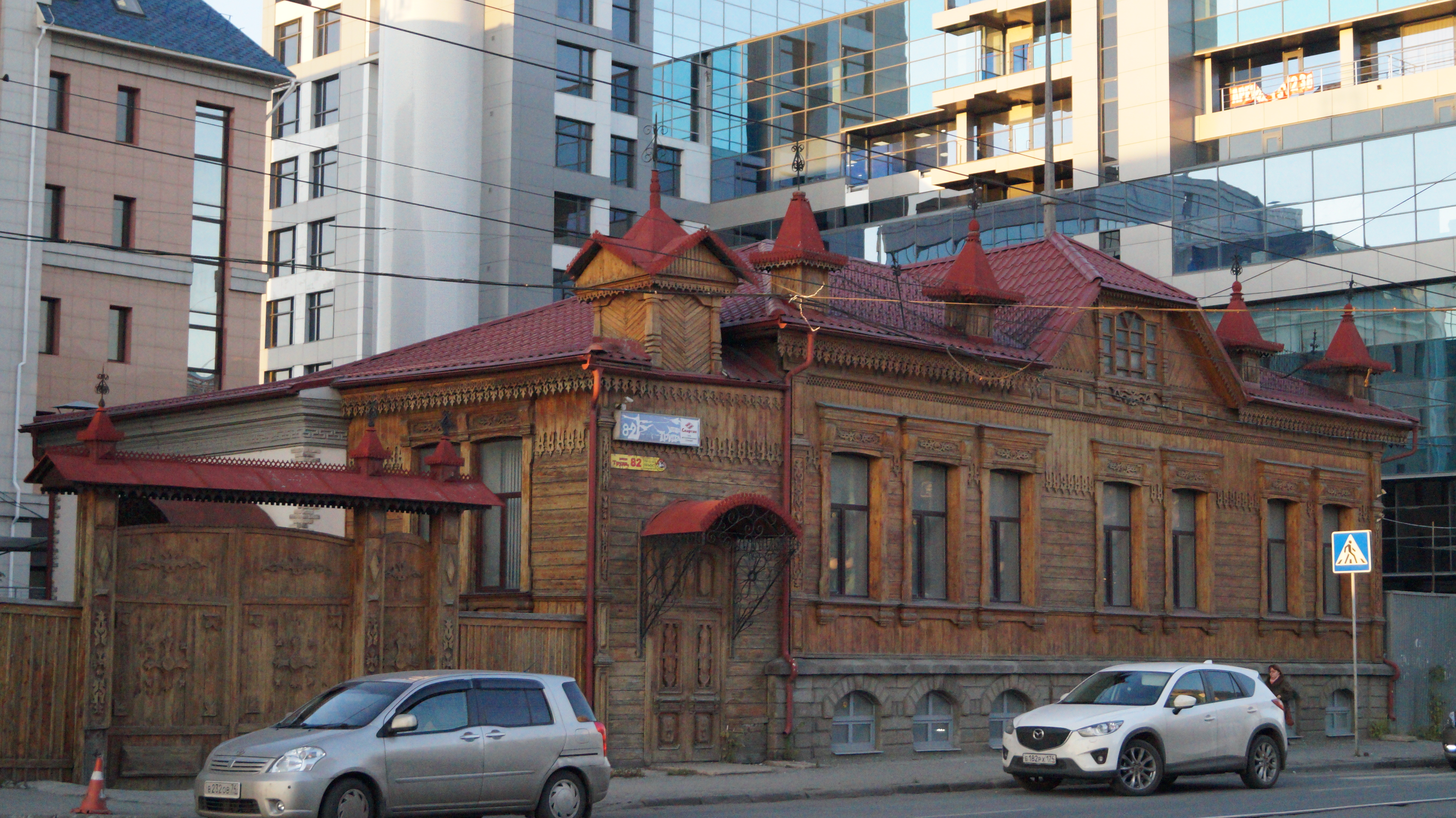 Дом братьев Степановых: улица Труда, 82, Челябинск, Челябинская область